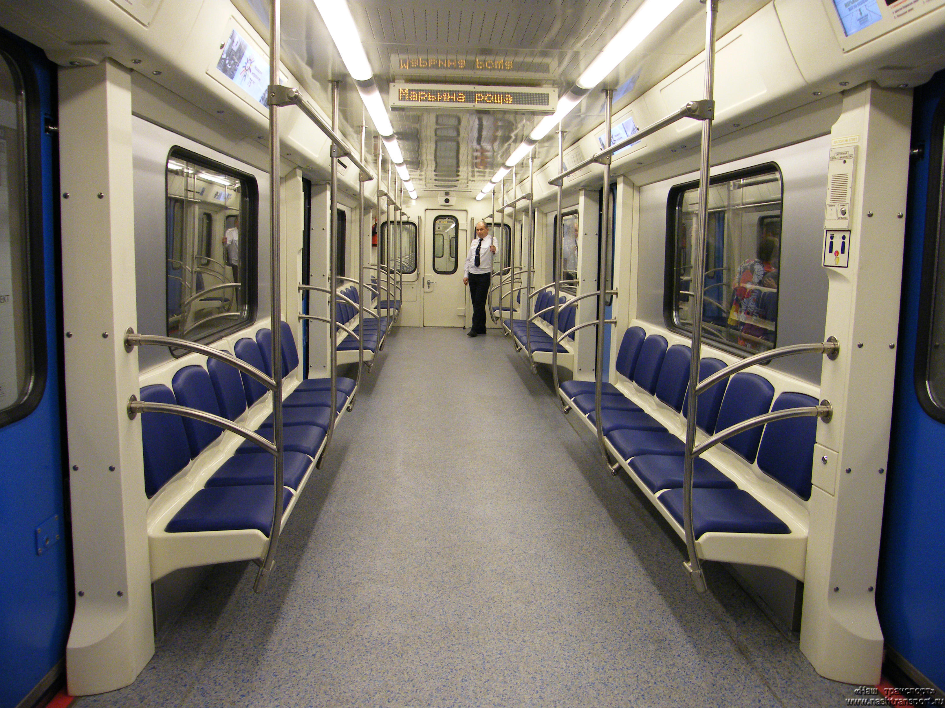 Пассажирский салон электропоезда метро 81-760/761